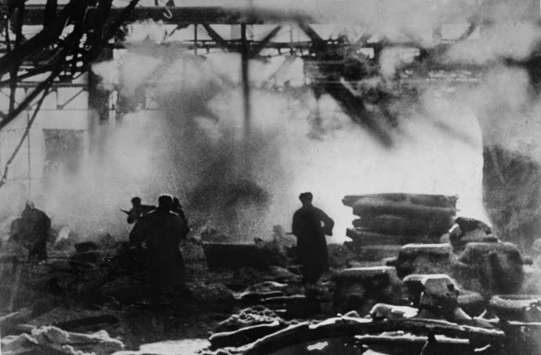 Russland, Kesselschlacht Stalingrad ADN-ZB/SNB/ II. Weltkrieg 1939-45 Die Stalingrader Schlacht begann im Juli 1942. In erbitterten, beiderseits verlustreichen Kämpfen wehrte die Rote Armee das weitere Vordringen der faschistischen Truppen ab. Während der sowjetischen Gegenoffensive im November 1942 wurden über 300 000 Mann eingeschlossen. Die Reste dieser Verbände, etwa 91 000 Mann, kapitulierten am 31.1. und 2.2.1943 Rotarmisten während des Kampfes in einer zerstörten Werkhalle. Foto Jakow Rjumkin